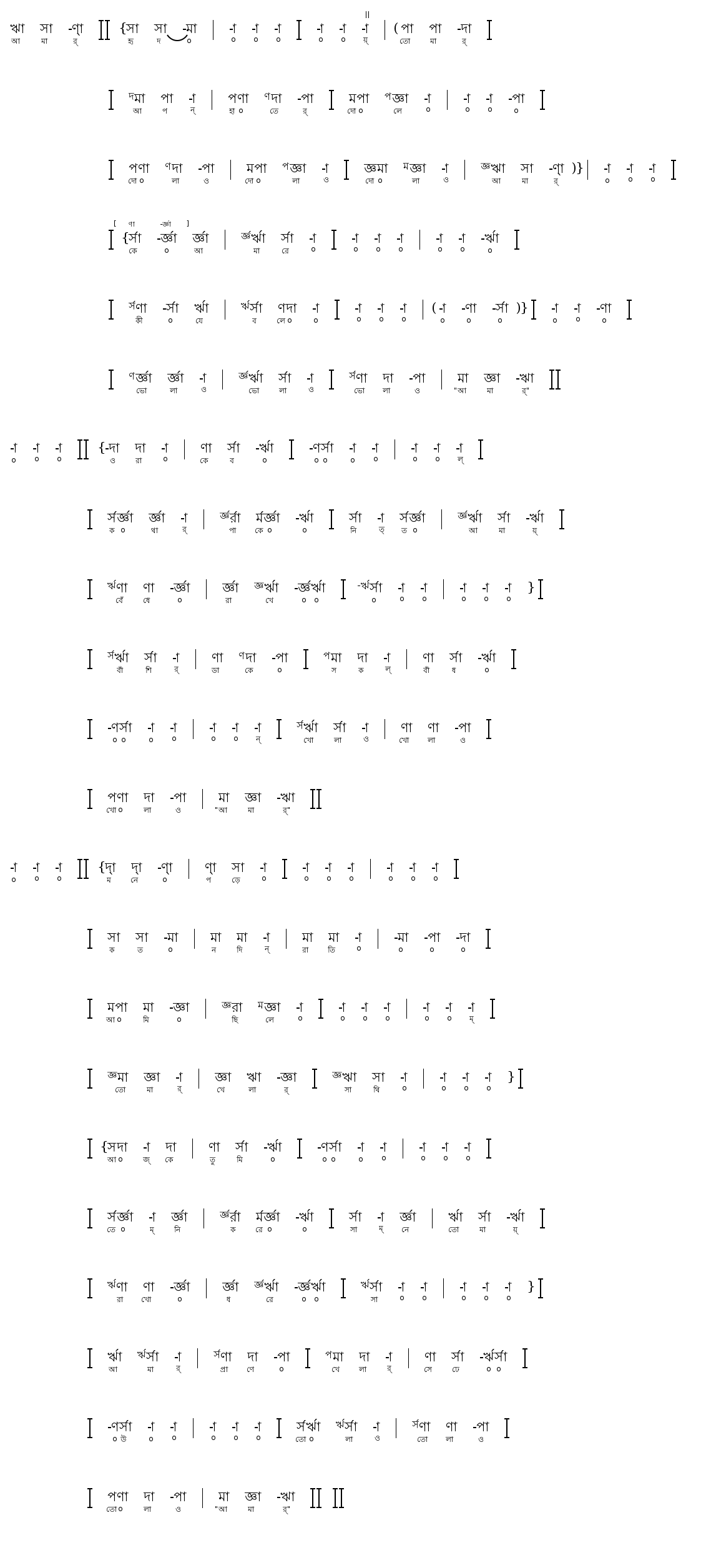 আকারমাত্রিক স্বরলিপির উদাহরণ